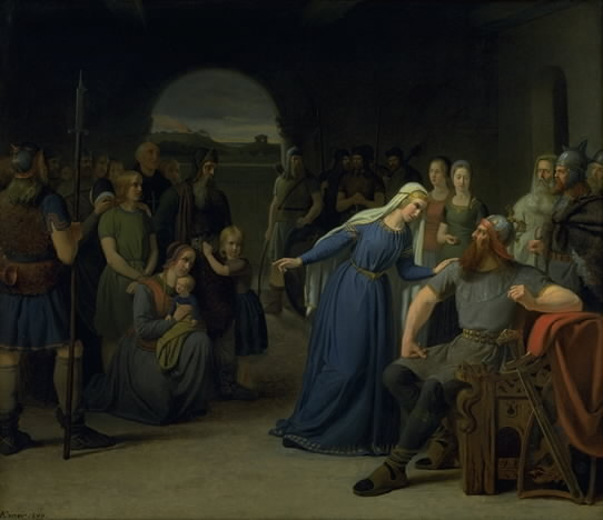 Julius Exner (1825-1910), Thyra Danebod forsøger at formilde Gorm den Gamles vrede mod nogle fangne kristne, 1849